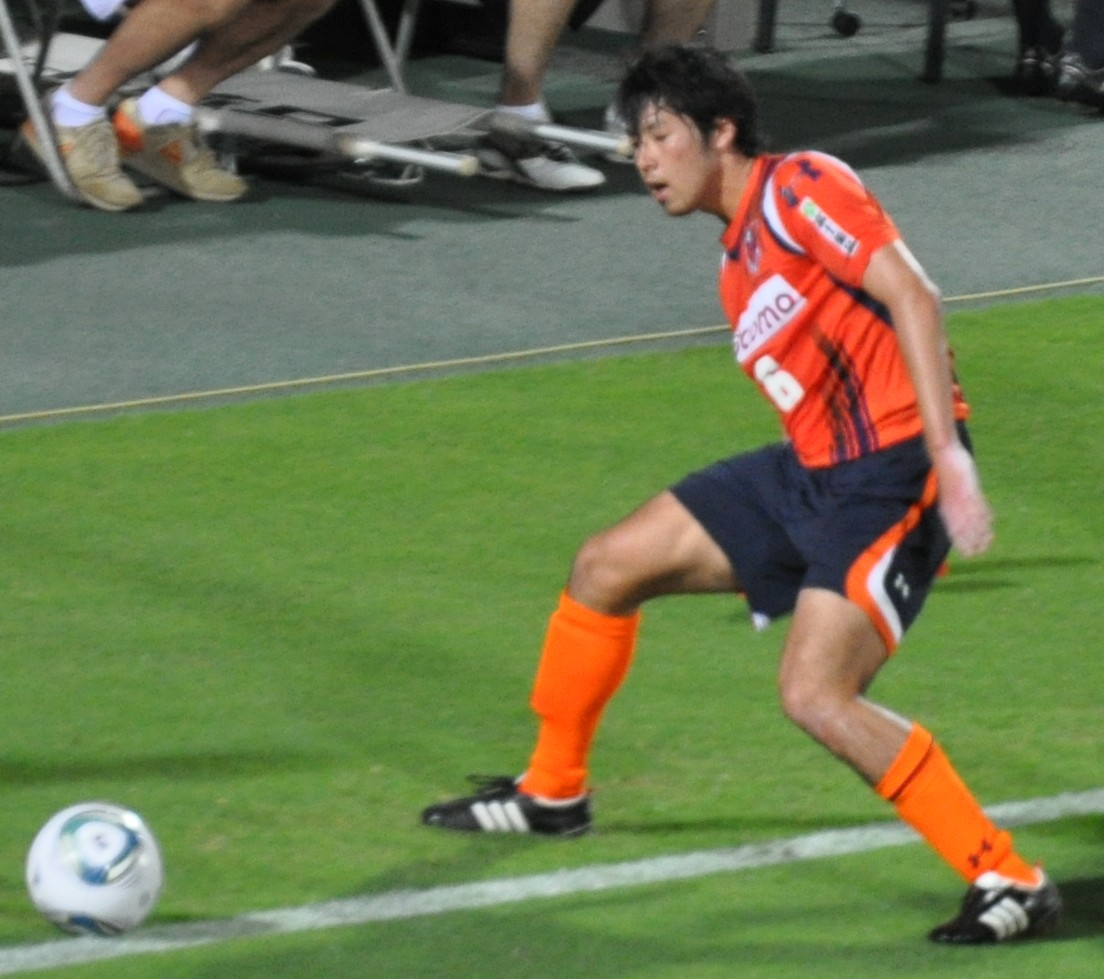 Takuya Aoki, 2011.07.10 Omiya Ardija 2-3 Gamba Osaka_292